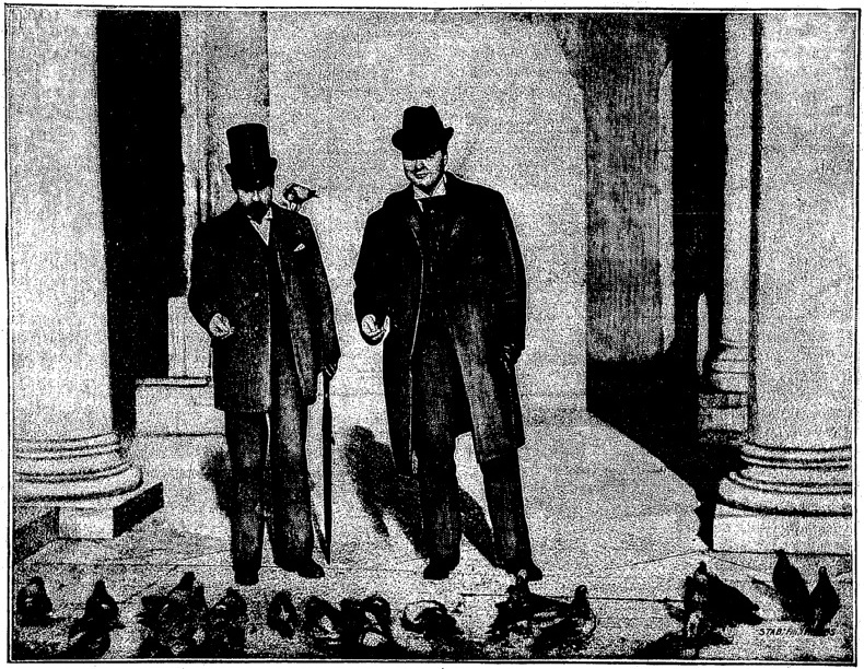 "Arton et Dupas sur la place Saint-Marc, à Venise (photographie instantanée)". [photographie prise lors des derniers jours de décembre 1892 ou des premiers jours de janvier 1893 - Attribuée lors du procès Dupas (1896) à Salviati, mais la signature en bas à droite "Stab. Anders." (?) pourrait être celle d'Anderson].